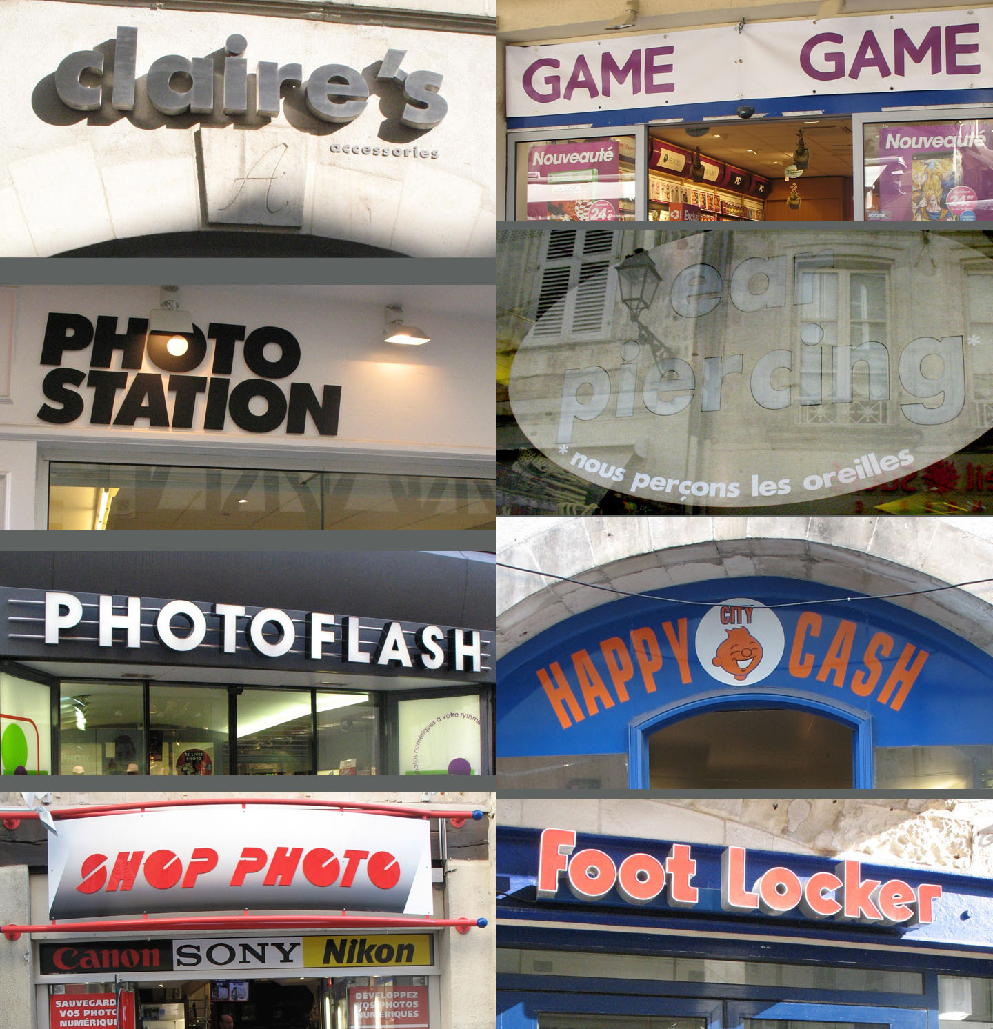 Enseignes de commerce dans les rues du quartier historique de La Rochelle, France